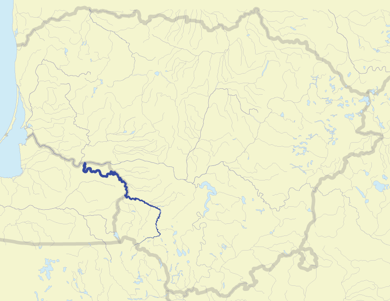 River Šešupė